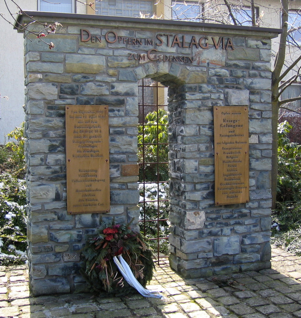 Description: Denkmal Stalag VI A in Hemer Source: selbst fotografiert Date: 19. März 2006 Author: Bubo